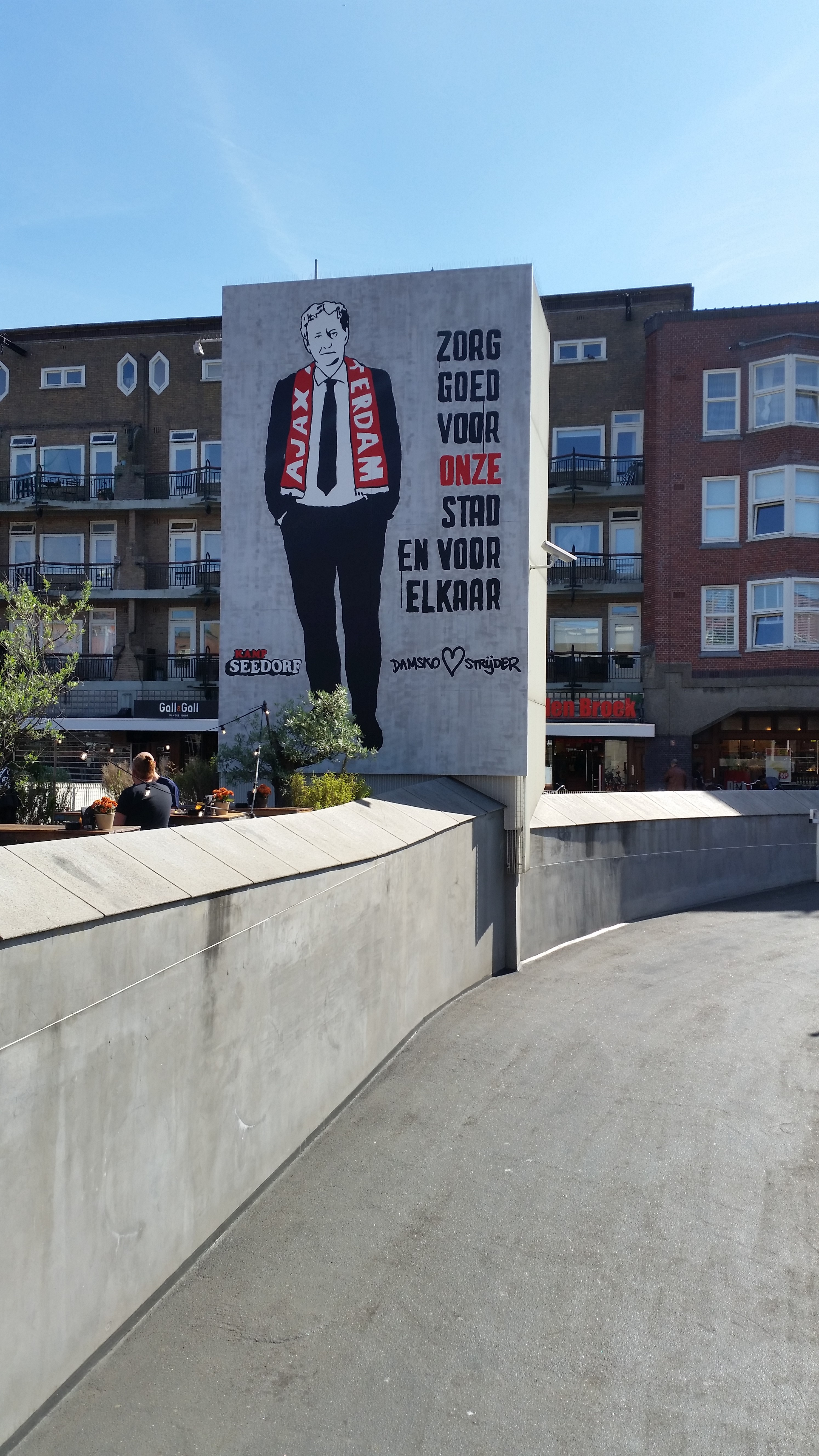 Eberhard van der Laan door Kamp Seedorf op het Mercatorplein, Amsterdam-West